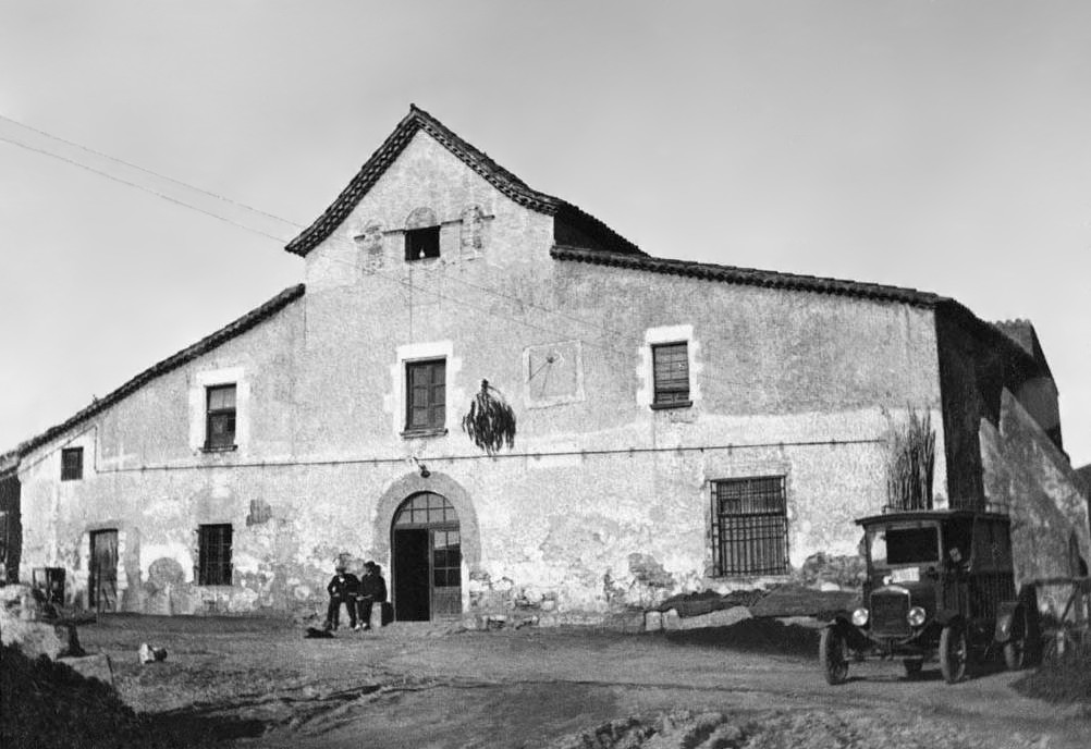 Façana de Can Solà amb gent i un cotxe d'època. Jordi Audet i Viñals (ca. 1928)